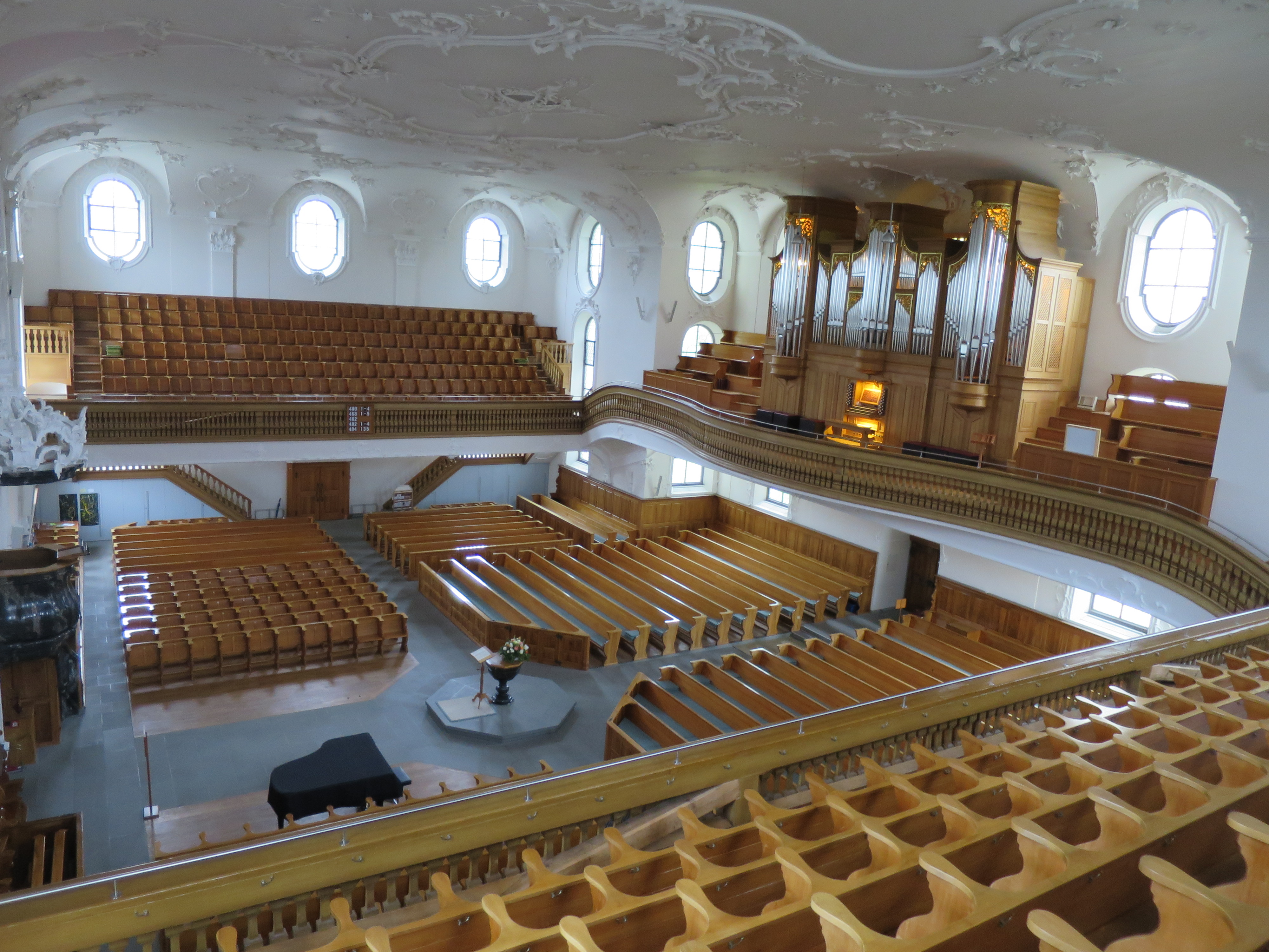 Reformierte Kirche Wädenswil - Innenraum mit Orgel